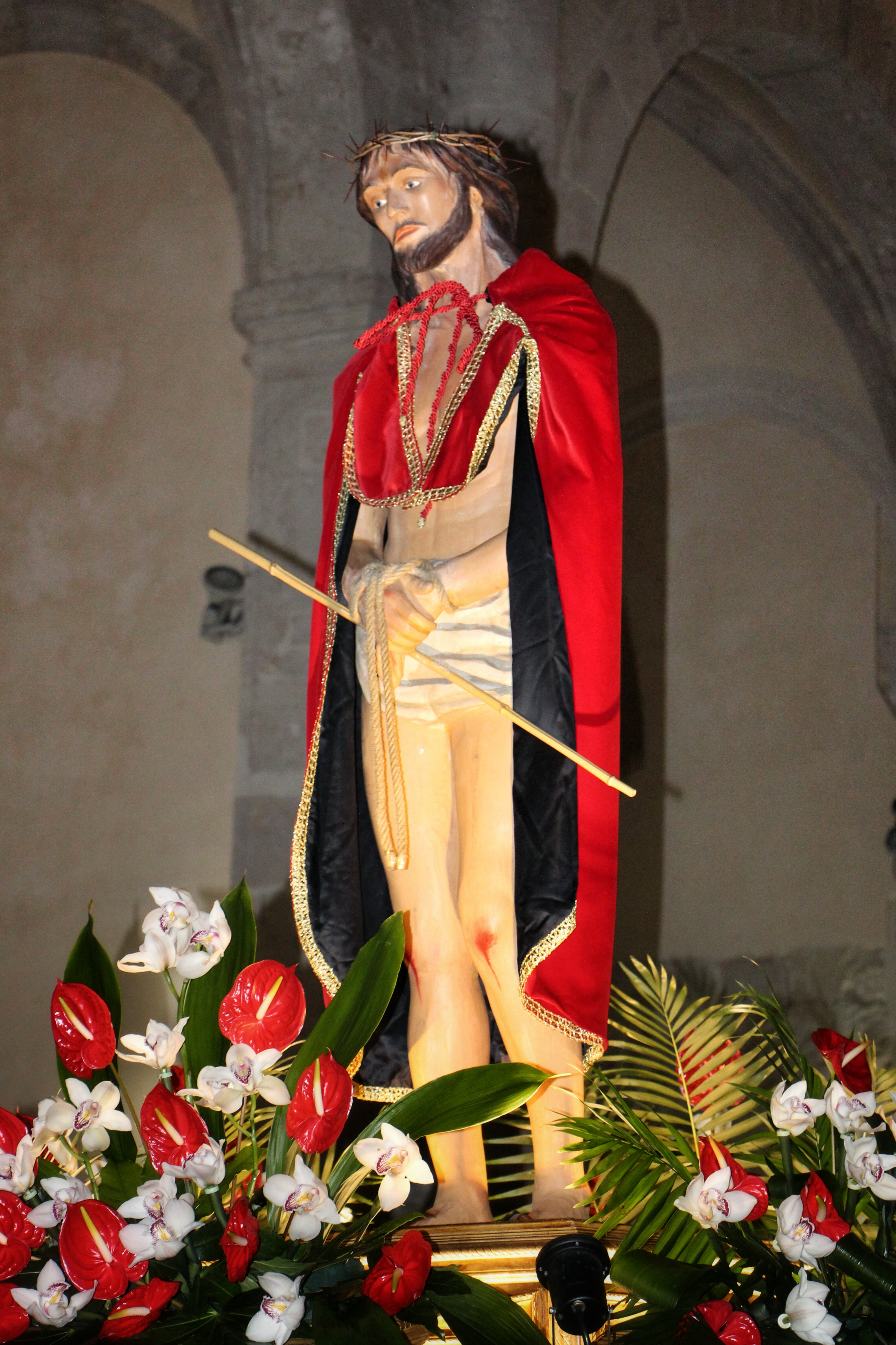 Imagen del Ecce Homo - Semana Santa Ayora